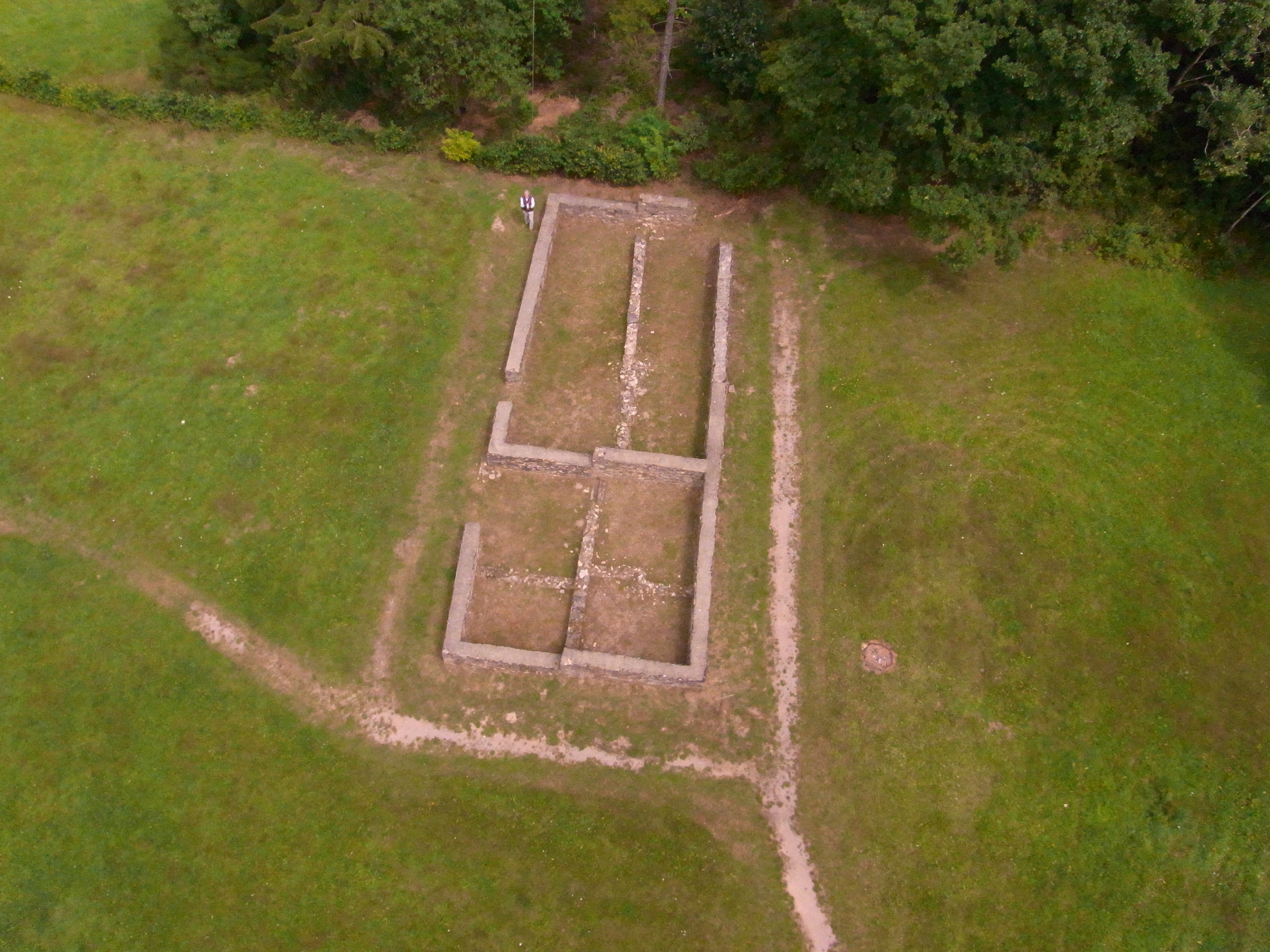 Kite aerial photography - Drachenluftbild des Hauptgebäudes